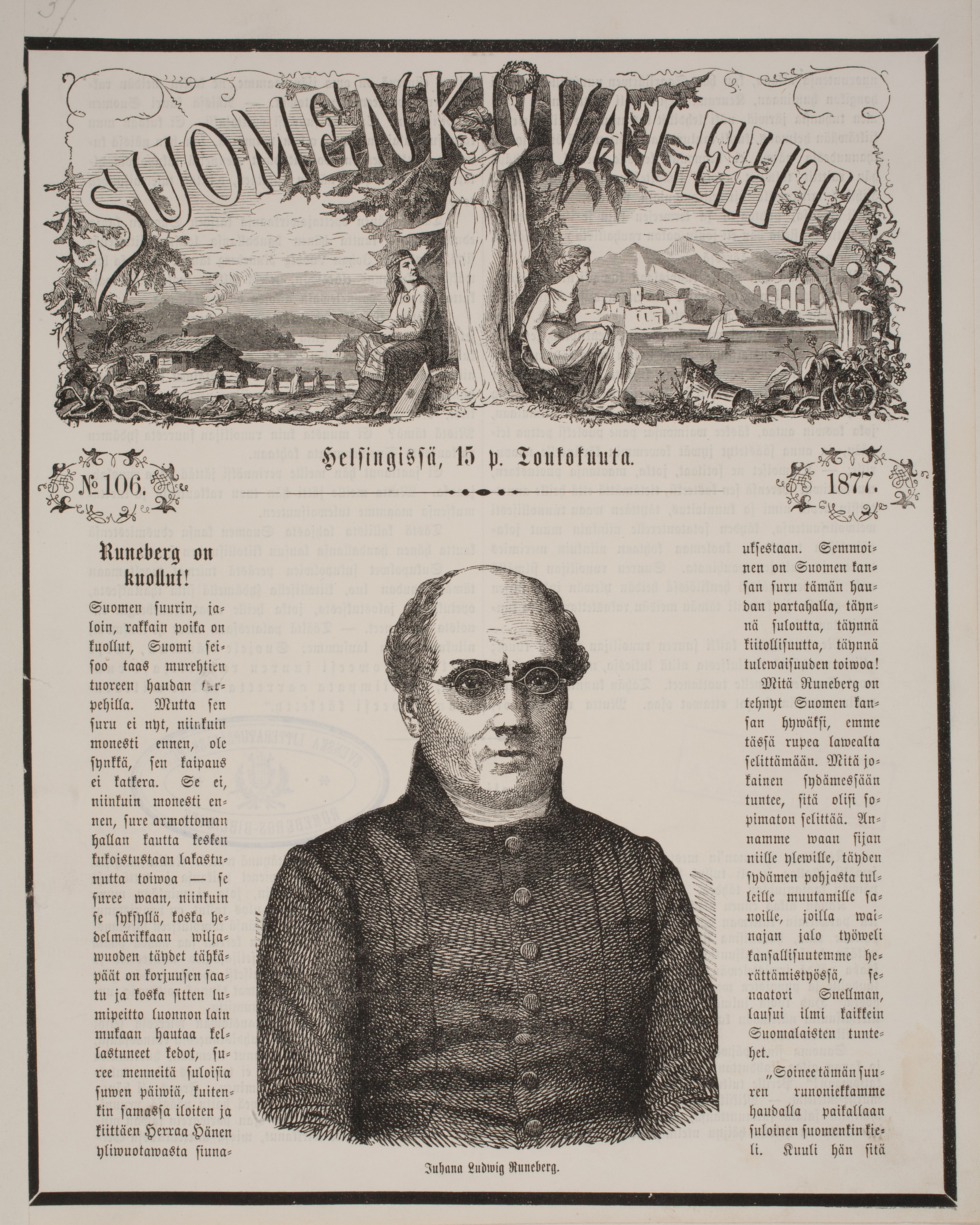 Johan Ludvig Runeberg. Träsnitt efter Philipsens fotografi 1858 tryckt i Suomen kuvalehti 15 maj 1877. Signum: slsa1160_394